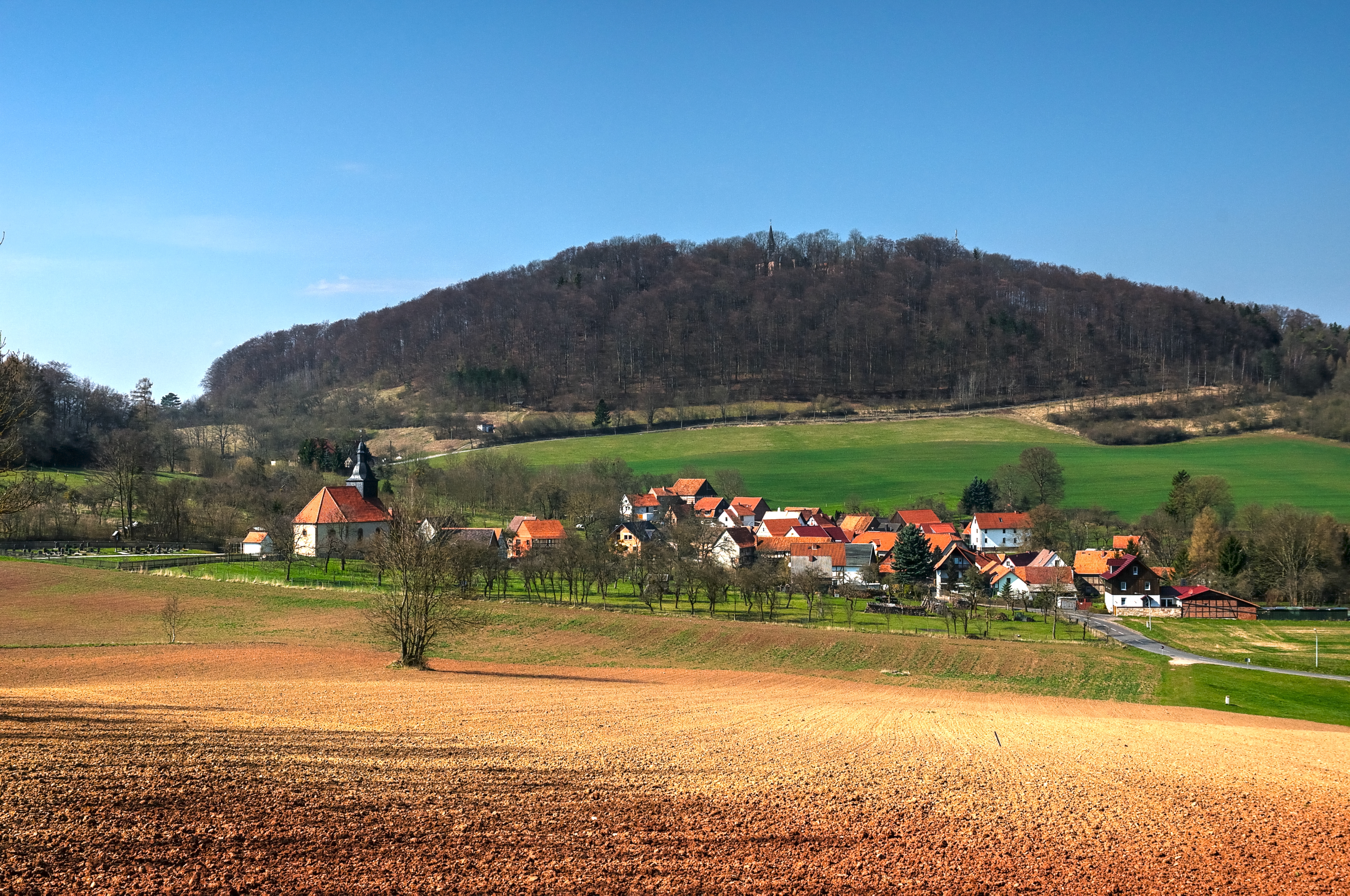 Döringsdorf im Eichsfeld unter dem Hülfensberg - Blick aus SüdOst